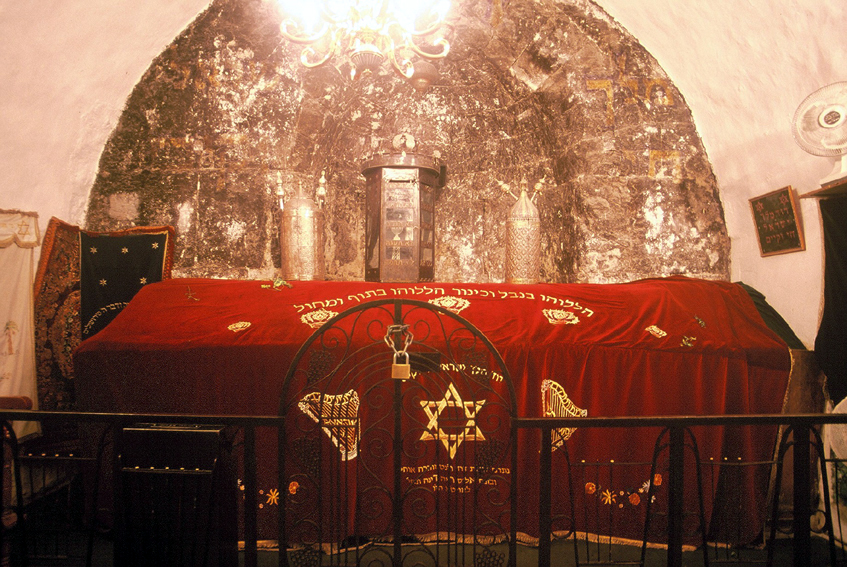 קבר דוד המלך הוא מבנה בהר ציון שבירושלים, בו על פי המסורת העממית היהודית, המוסלמית, כמו גם הנוצרית קבור דוד המלך. המסורת הנוצרית מוסיפה ורואה בקומה השנייה של המבנה את חדר הסעודה האחרונה, בה סעדו ישו ותלמידיו לפני שנלקח אל מותו. אתר זה, המקודש לשלוש הדתות, היה לנקודת מגע וחיכוך ביניהן במשך השנים..